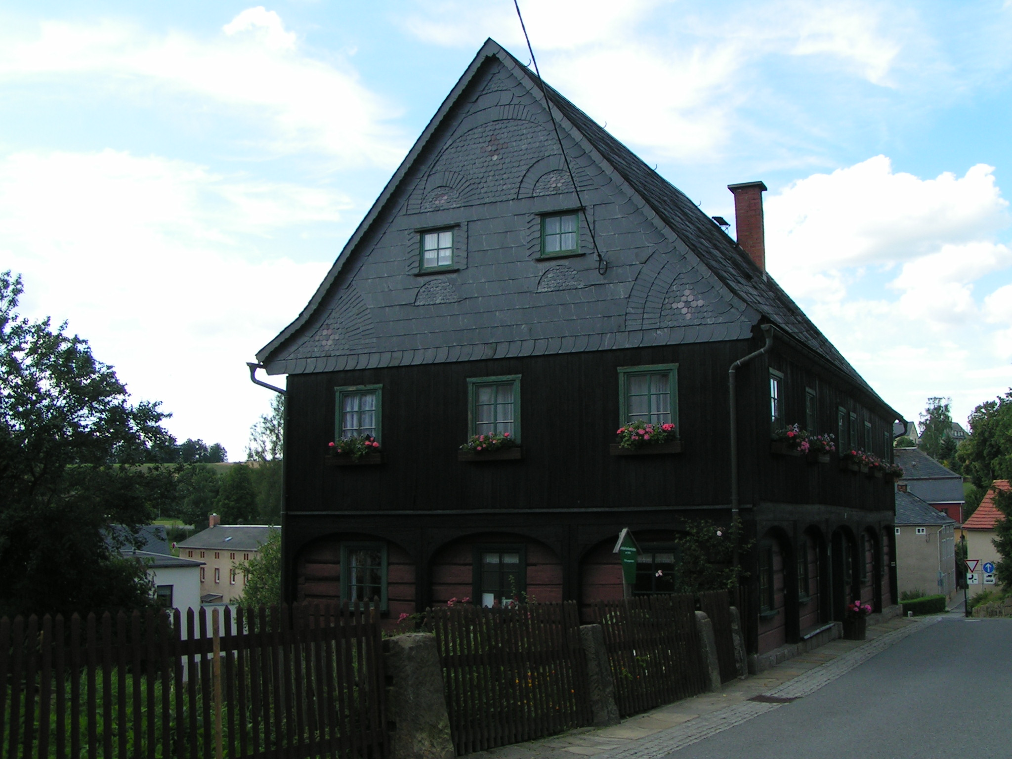 Heimatmuseum Hinterhermsdorf